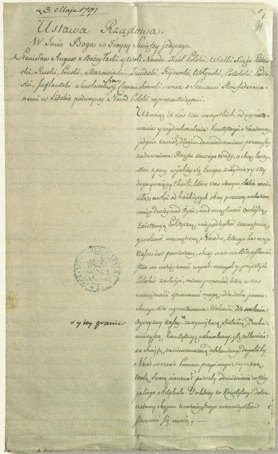 Rękopis Konstytucji 3 maja zawarty w Archiwum Sejmu Czteroletniego